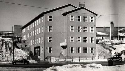 Helsingin kauppaoppilaitos, nyk. Diakonia-ammattikorkeakoulu valmistui 1956